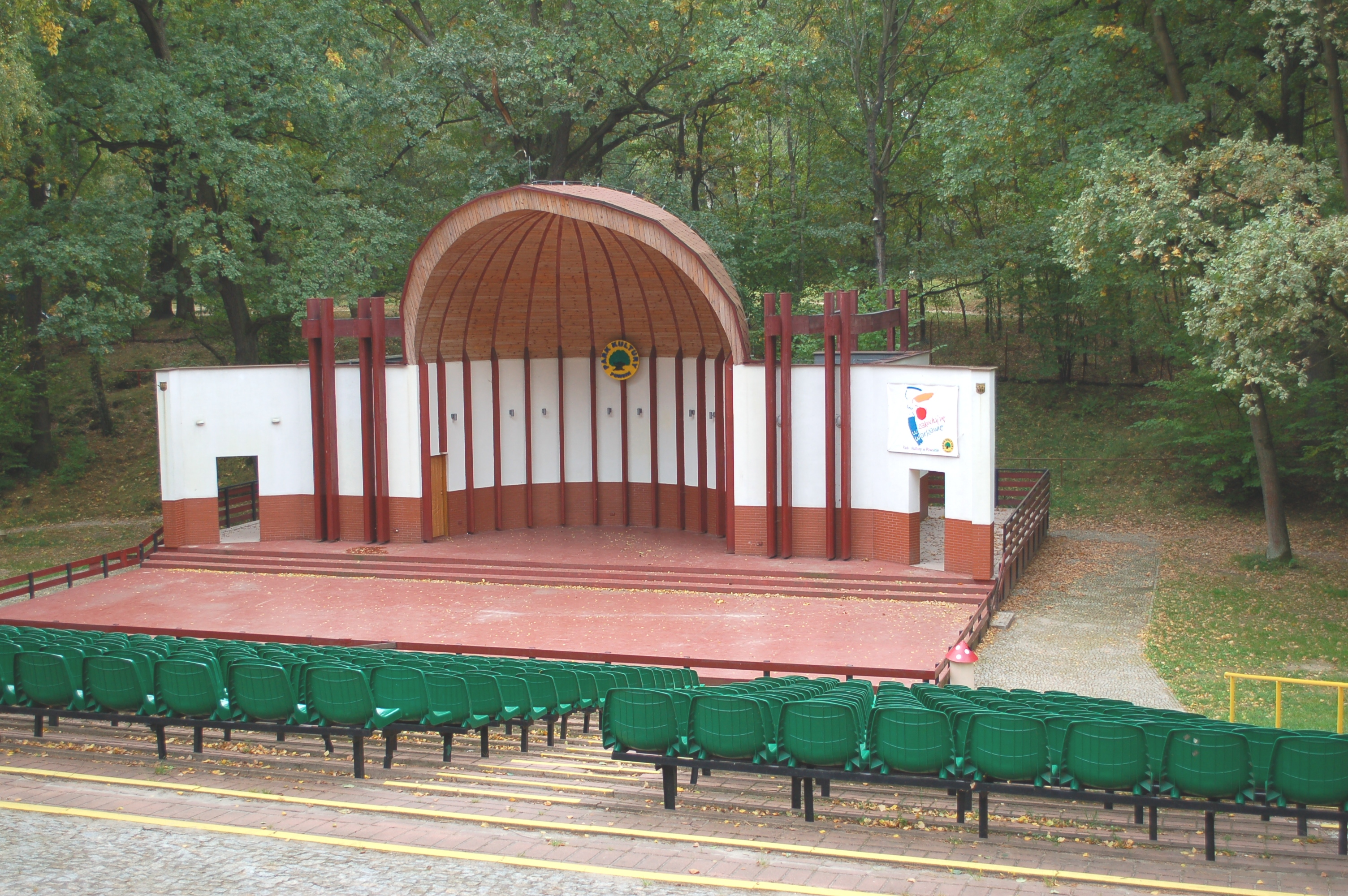 Powsin Park Warsaw